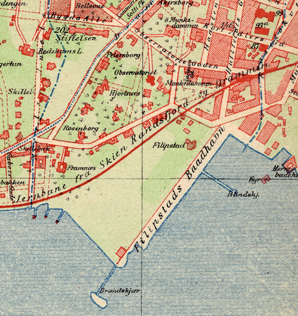 Filipstad, Oslo.